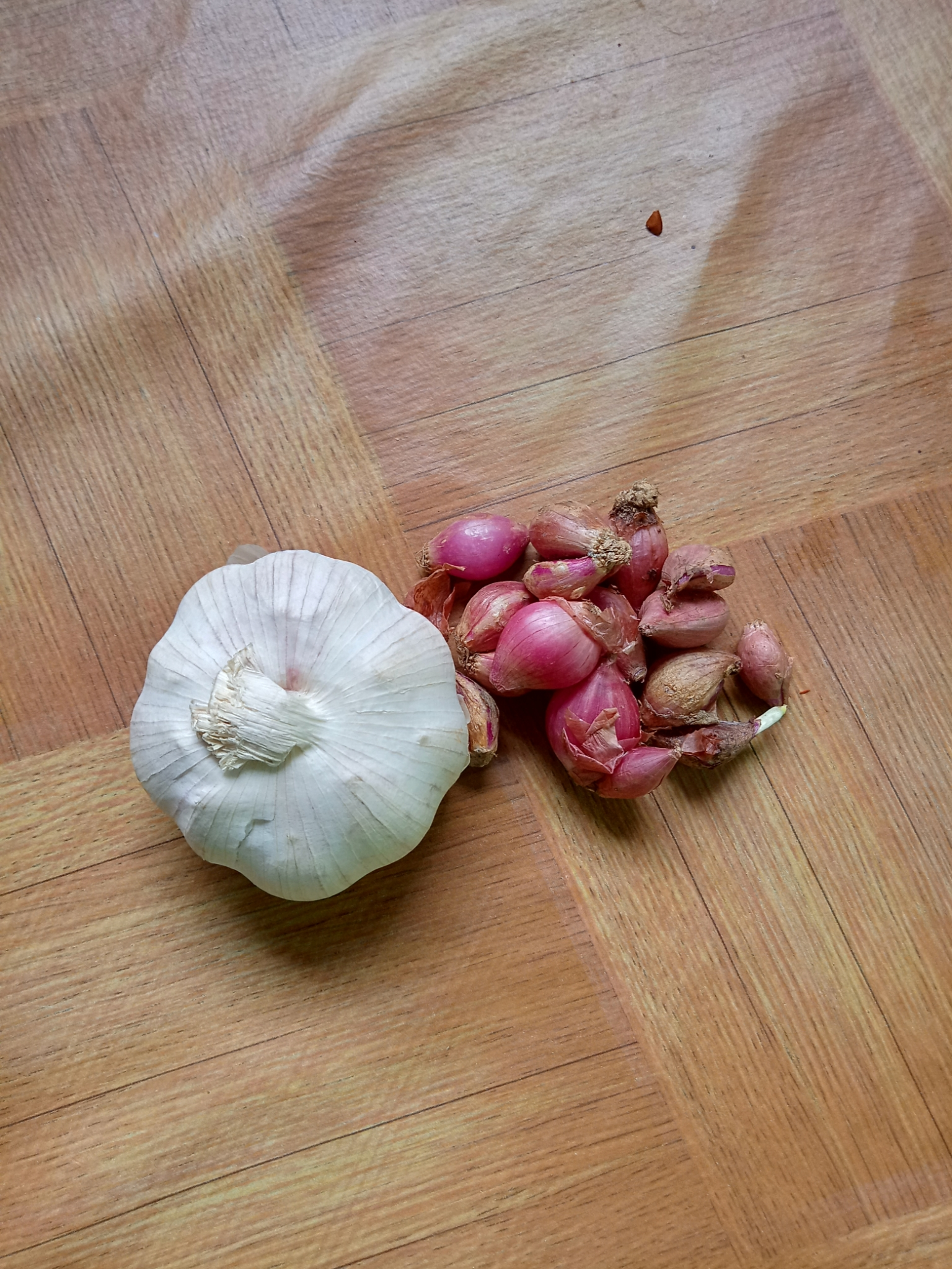 Minangkabau: Saonggok bawang merah jo saganggam bawang putiah